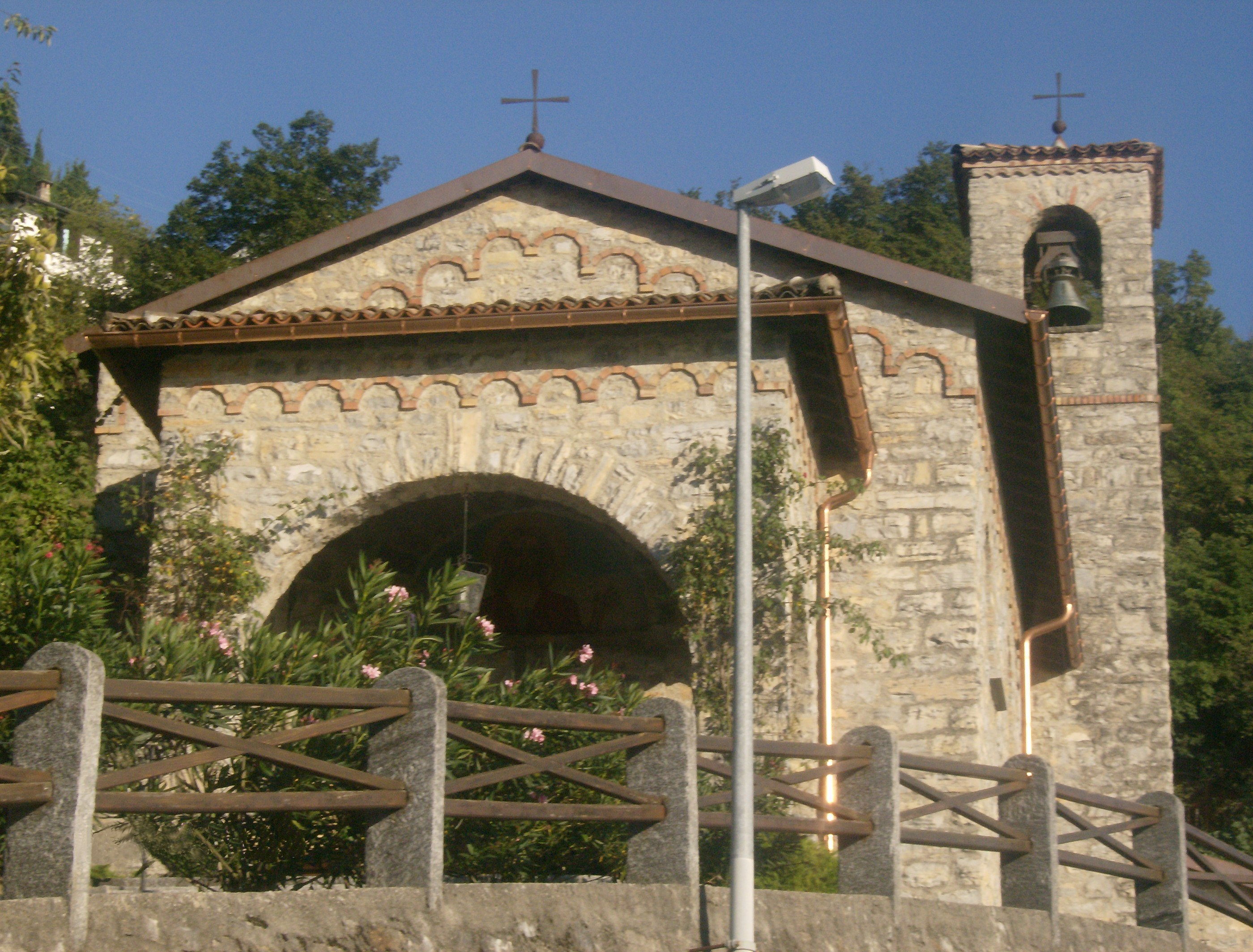 Oratorio del Cuore Immacolato di Maria